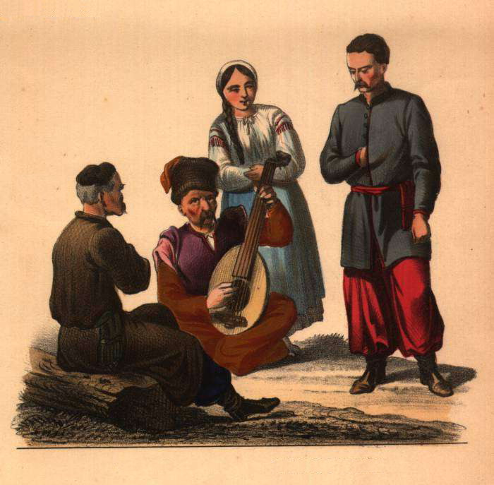 Die Ukrainer, Typen polnischer Einwohner, Ukrainer von Galizien, Lithografie von 1863 Jahre, Krakau